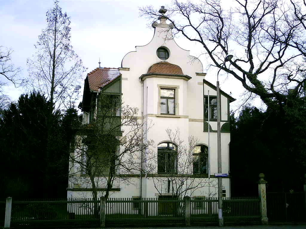 Barteldesplatz 2, Dresden, Saxony, Germany